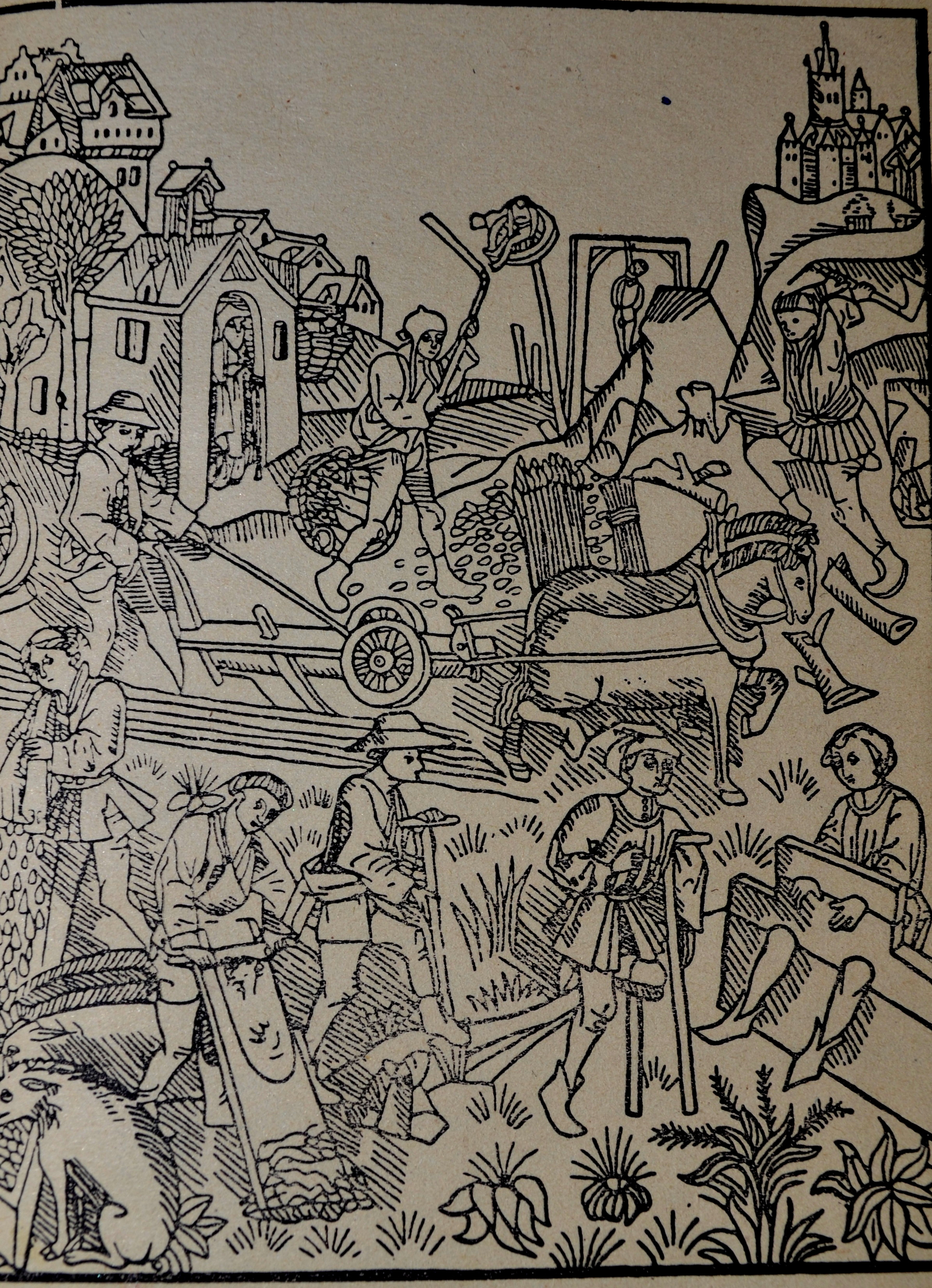 Kmečko življenje, lesorez iz knjige A. Bartels, Der Bauer, objavljeno v knjigi Bratka Krefta: Velika puntarija kot ilustracija k 1. dejanju.